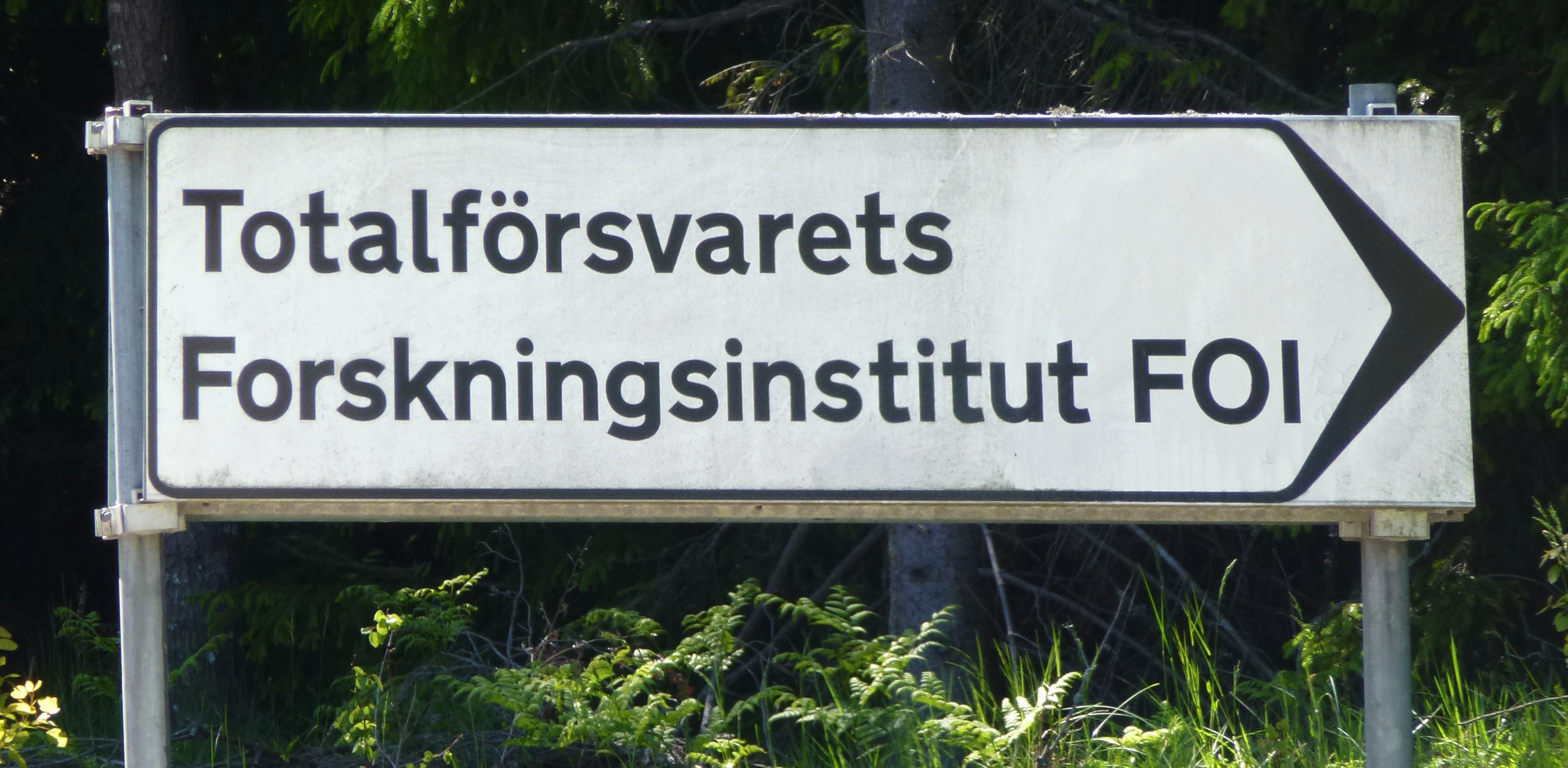 Totalförsvarets Forskningsinstitut, skylt vid Grindsjön